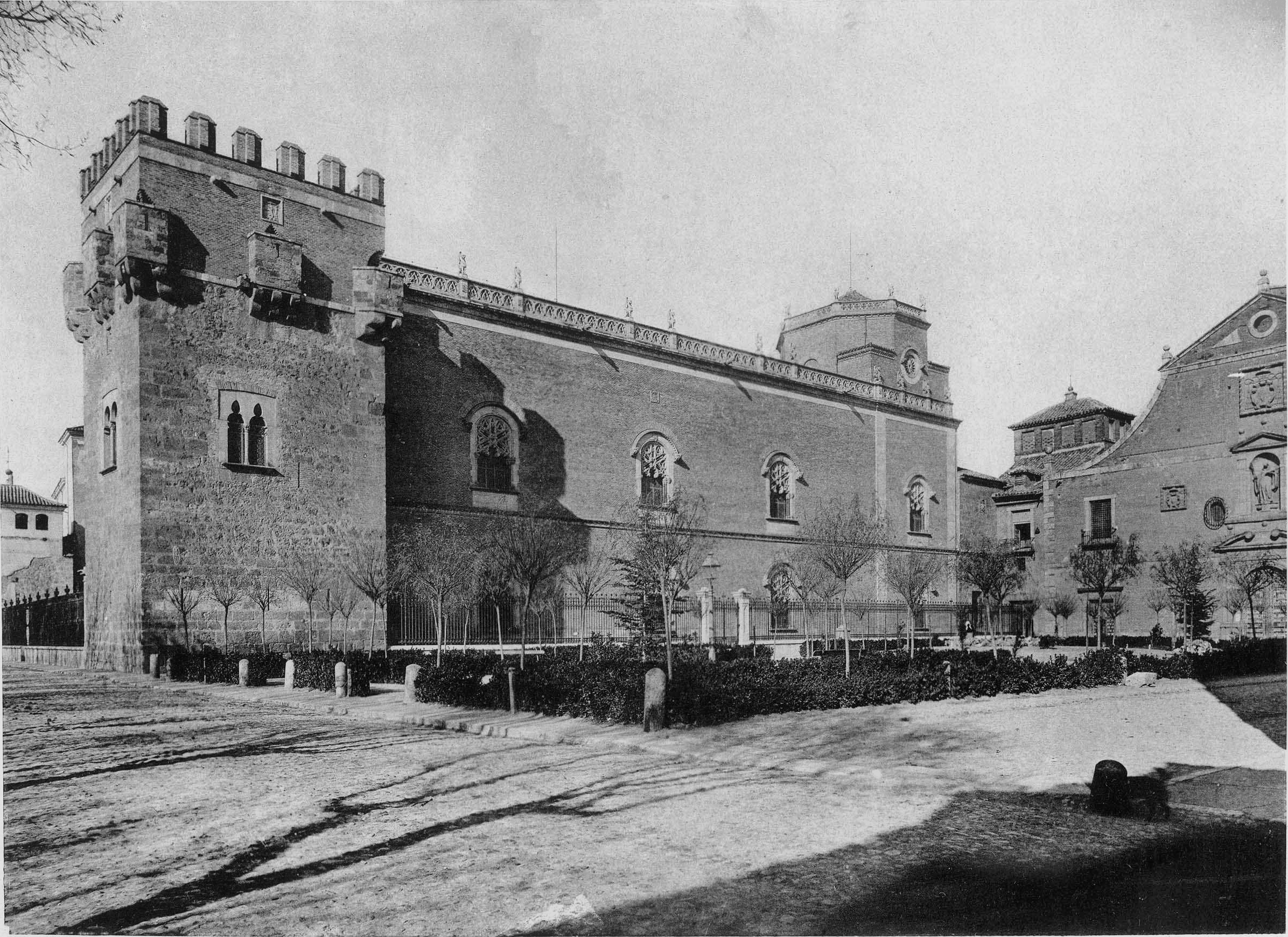 Fachada este del Palacio Arzobispal de Alcalá de Henares (Comunidad de Madrid - España). Fotografía publicada por Hauser y Menet en 1892.